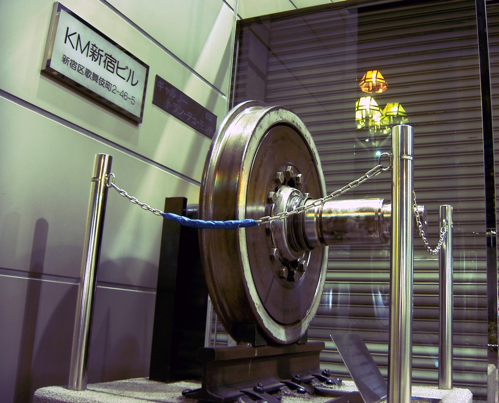 0_Series_Shinkansen_Wheel Tokyo Japan